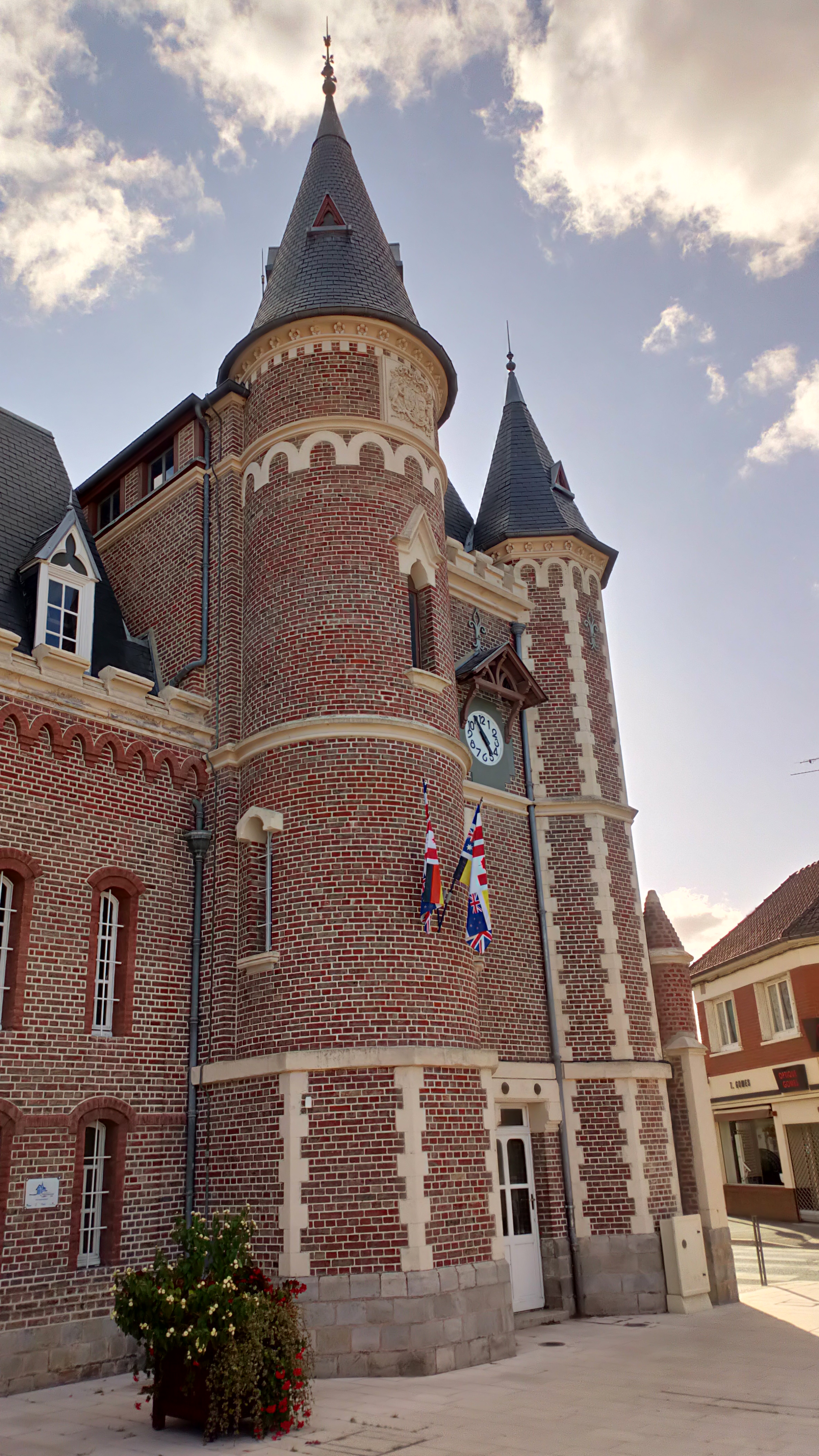 Corbie, Hôtel de ville 3